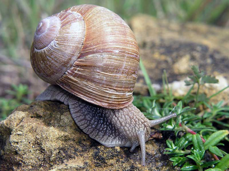 Один из объектов изучения малакологии - представитель наземных брюхоногих моллюсков Helix pomatia L.